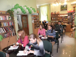 Читальна за ла Херсонської ОБД.